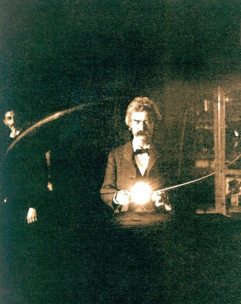 Mark Twain in Nikola Tesla's lab; 1894